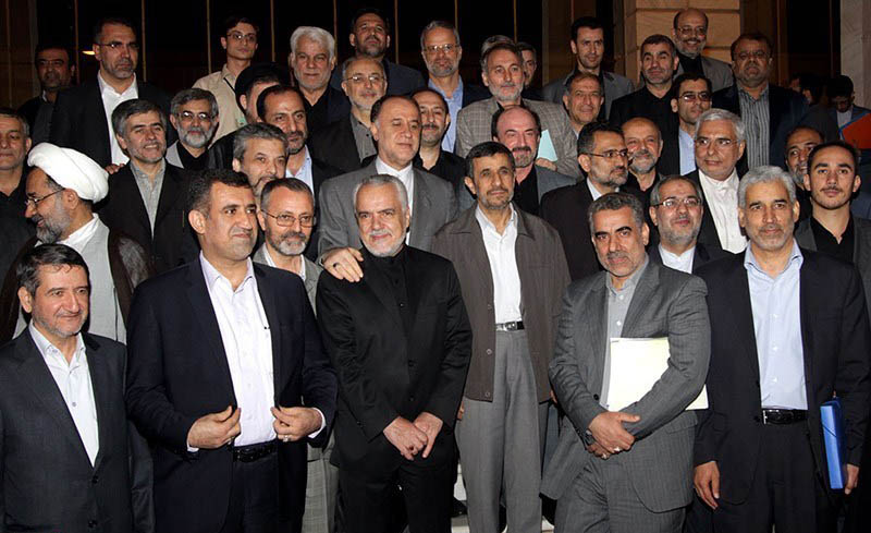 اعضای هیئت دولت دهم جمهوری اسلامی ایران پس از آخرین نشست